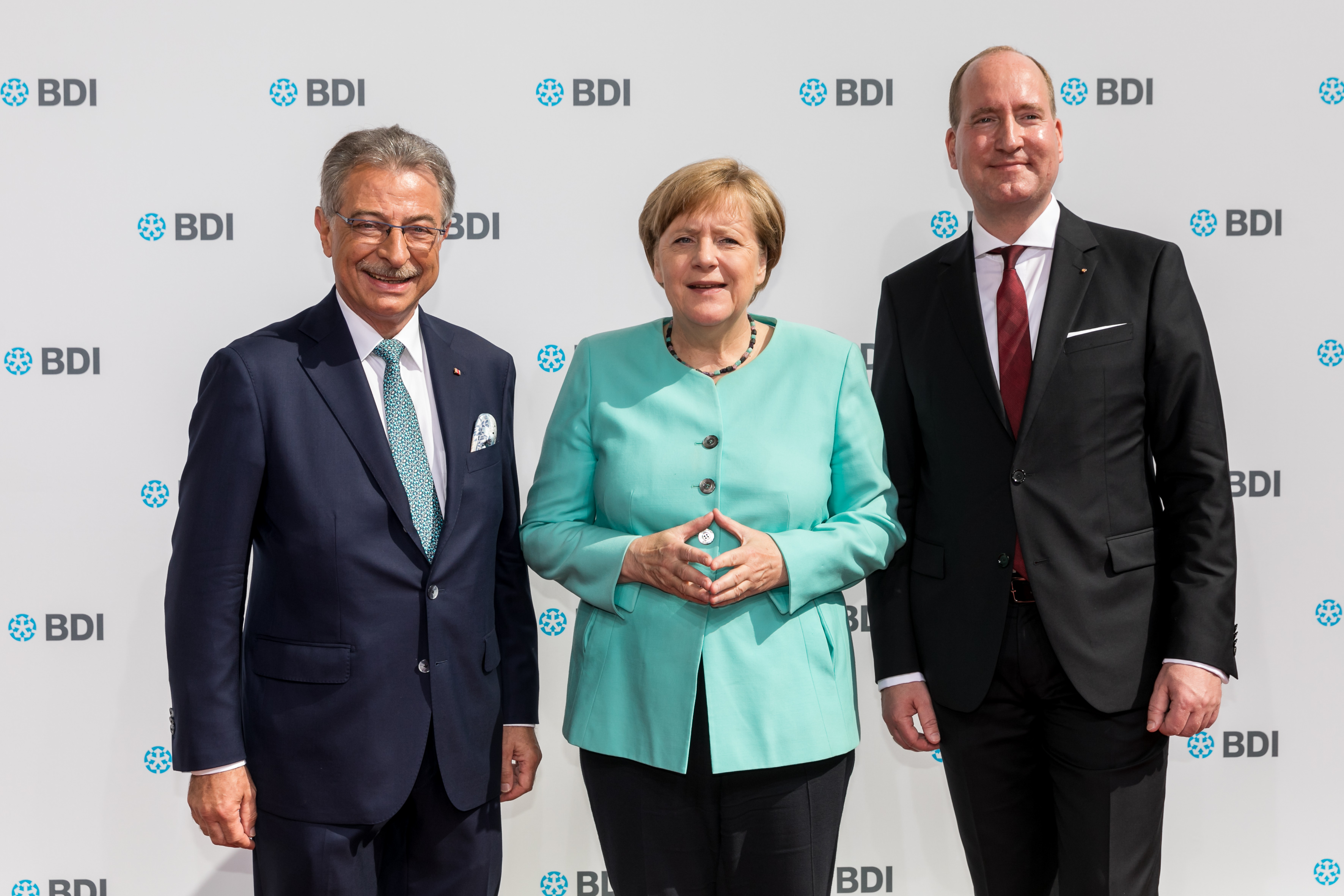 Von linksː BDI-Präsident Dieter Kempf, Bundeskanzlerin Angela Merkel und BDI-Hauptgeschäftsführer Joachim Lang beim Tag der Deutschen Industrie 2017